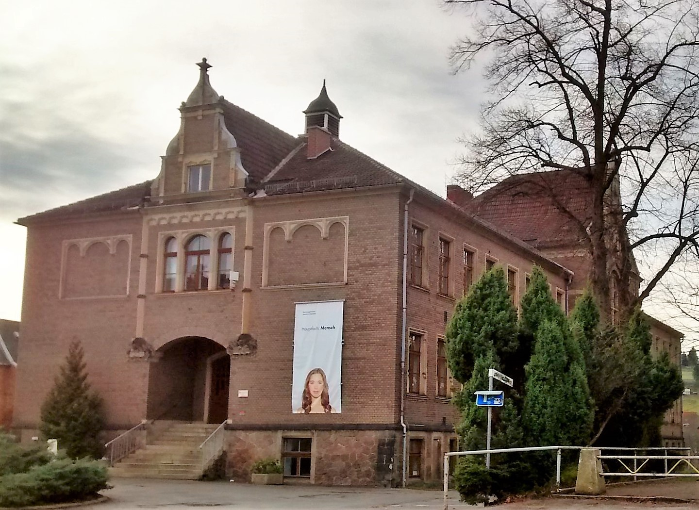 Evangelisches Gymnasium Mylau, Friedenshain 2